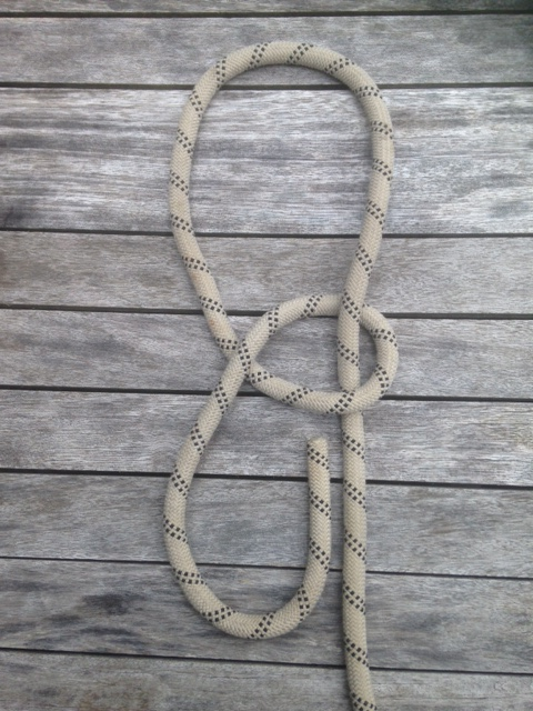 descriptif noeud 1ere phase